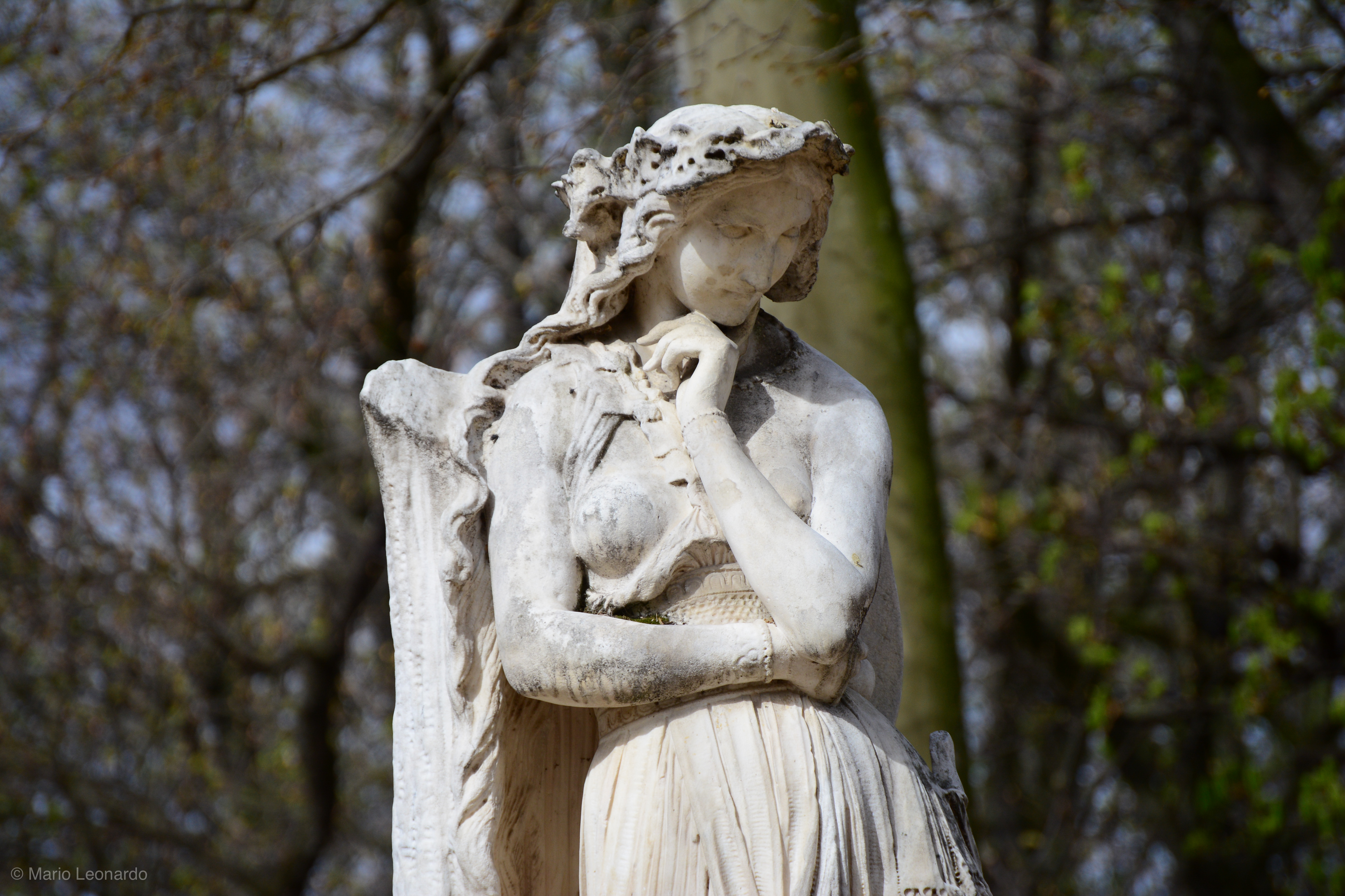 Paris-123